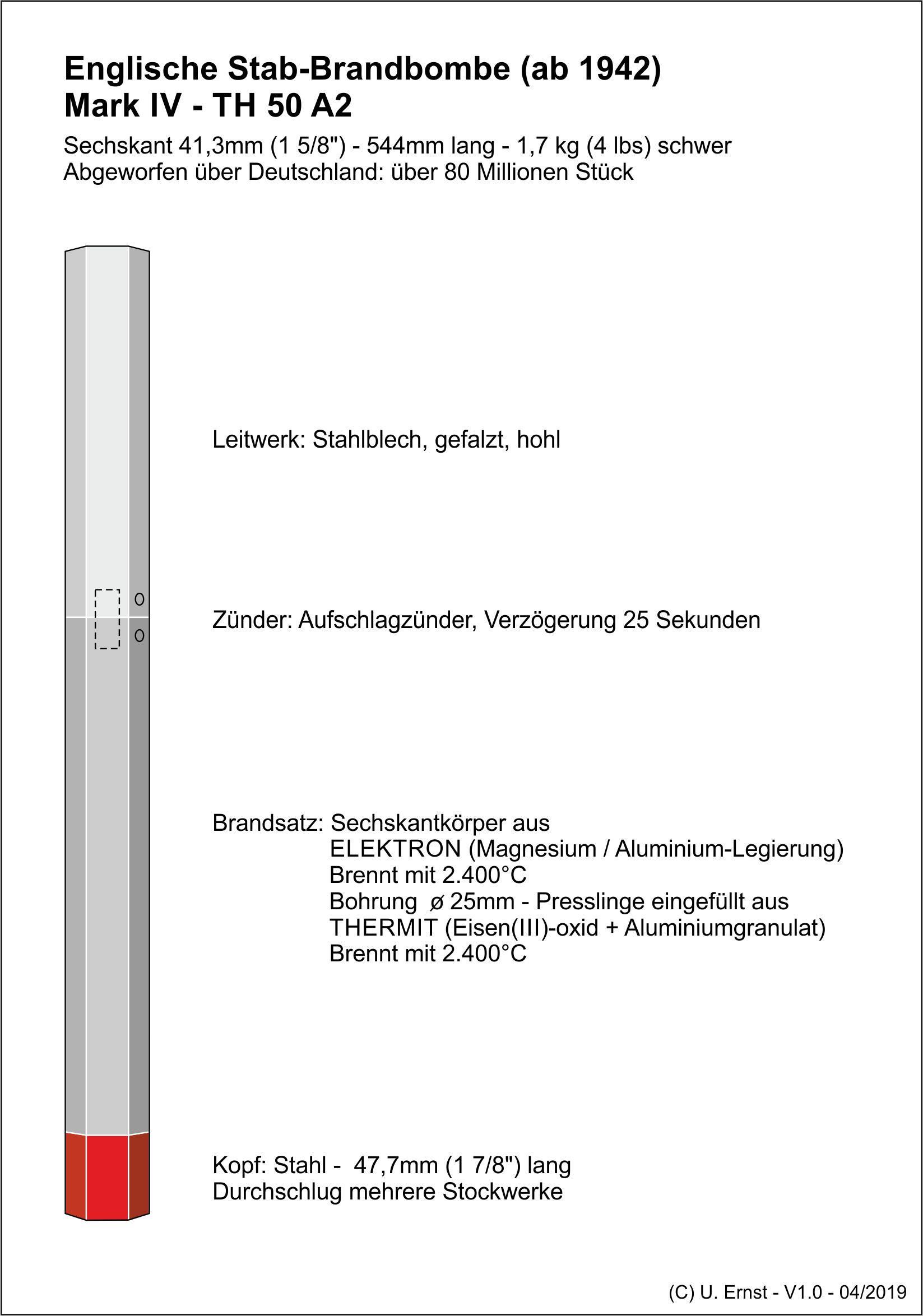 Technische Beschreibung der engl. Stabbrandbombe Mark IV